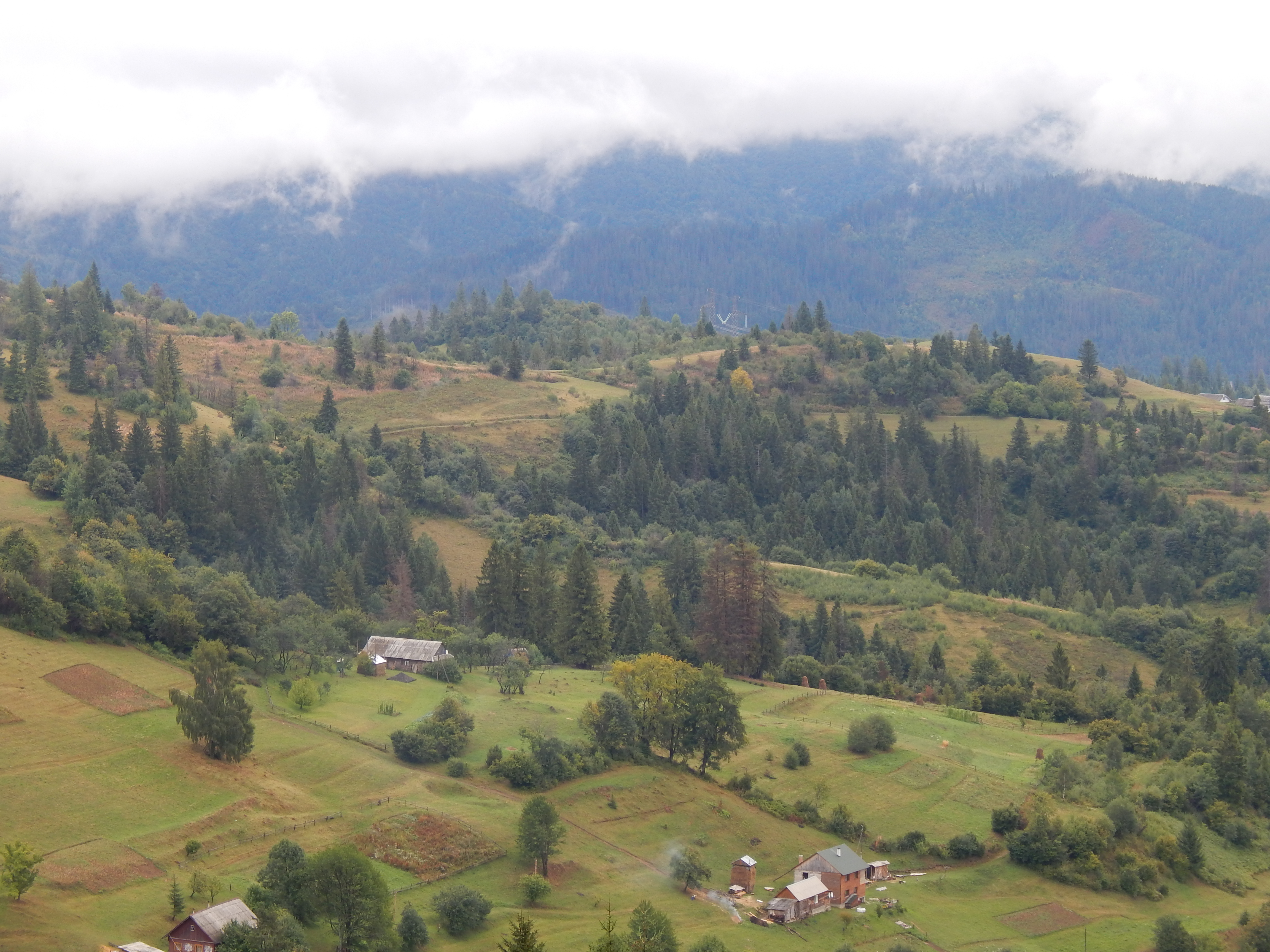 Сколівські Бескиди, Сколівський, Дрогобицький, Турківський райони